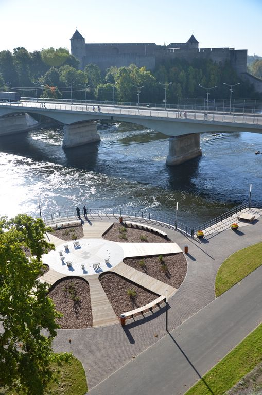 Narva jõe promenaad. Päikese plats